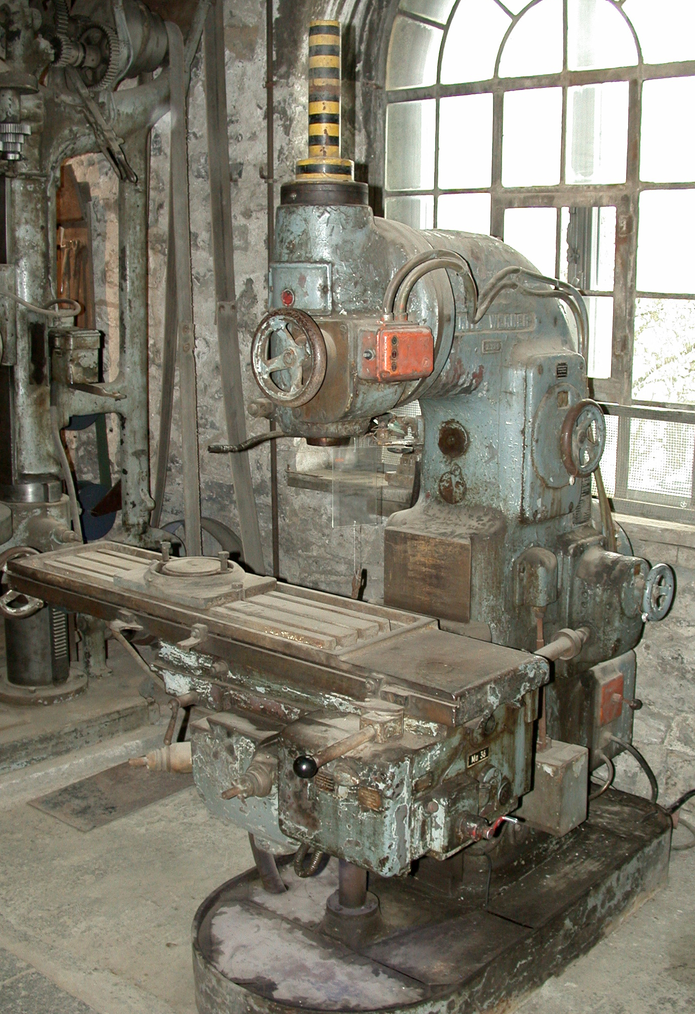 Historische Fräsmaschine im Tertiär- und Industrie-Erlebnispark Stöffel im Westerwald.